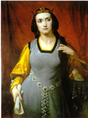 Marie Dorval dans le rôle d'Agnès de Méranie, peinture, huile sur toile ; 120x89cm. Collection Théâtre national de l'Odéon